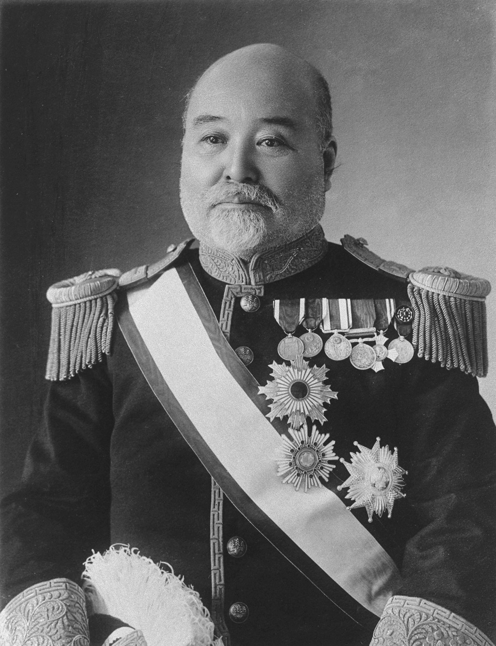 Portrait of Takahashi Korekiyo (高橋是清, 1854 – 1936)